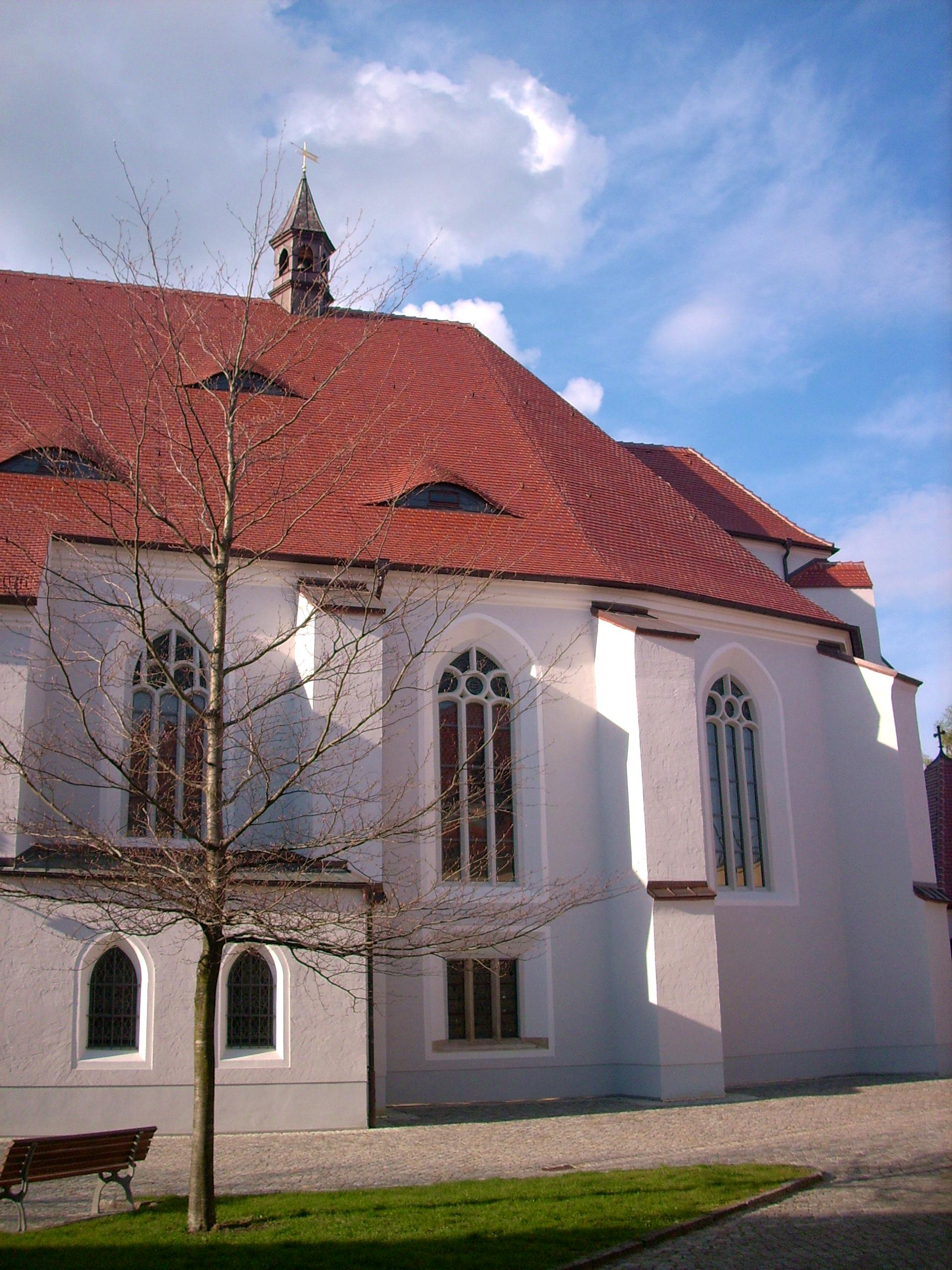 Katholische Pfarrkirche in Wittichenau, Detailansicht